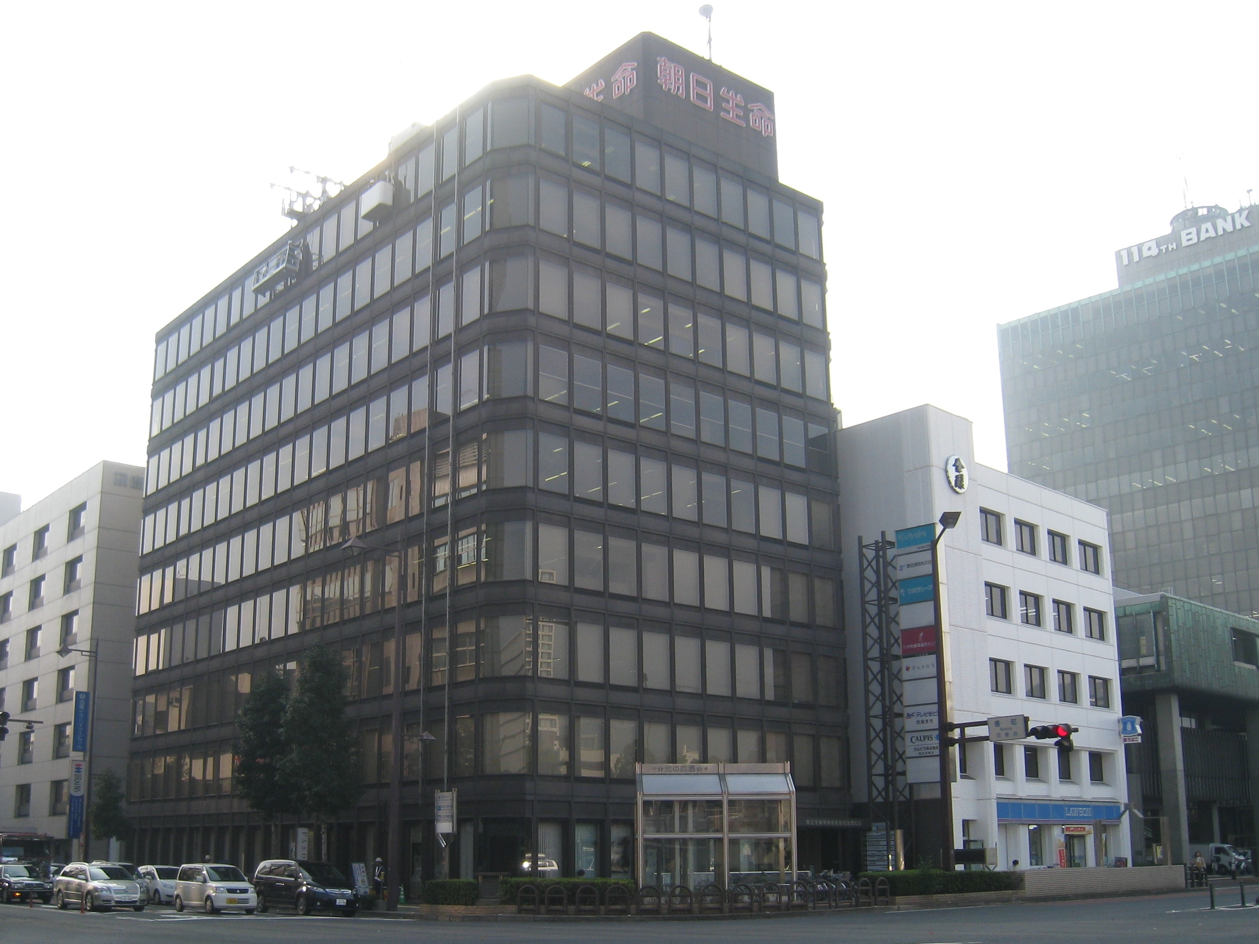 香川県高松市亀井町にある朝日生命保険相互会社高松ビル。TSCテレビせとうちの四国支社が入居する。